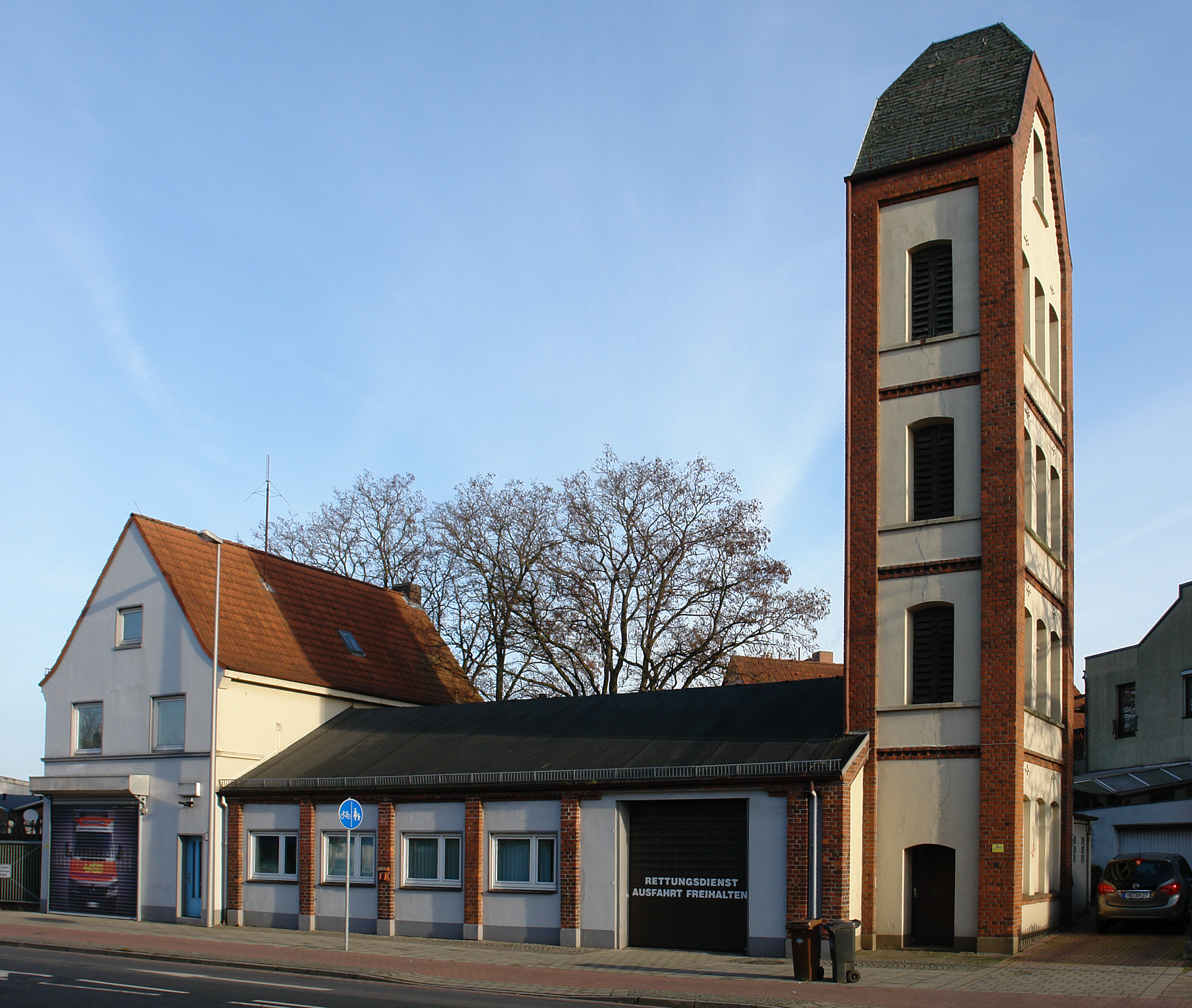 Ehemalige Rettungswache Hemelingen, An der Grenzpappel. Baujahr um 1908. Gebäude wurde bis vor wenigen Jahren noch vom ASB genutzt.